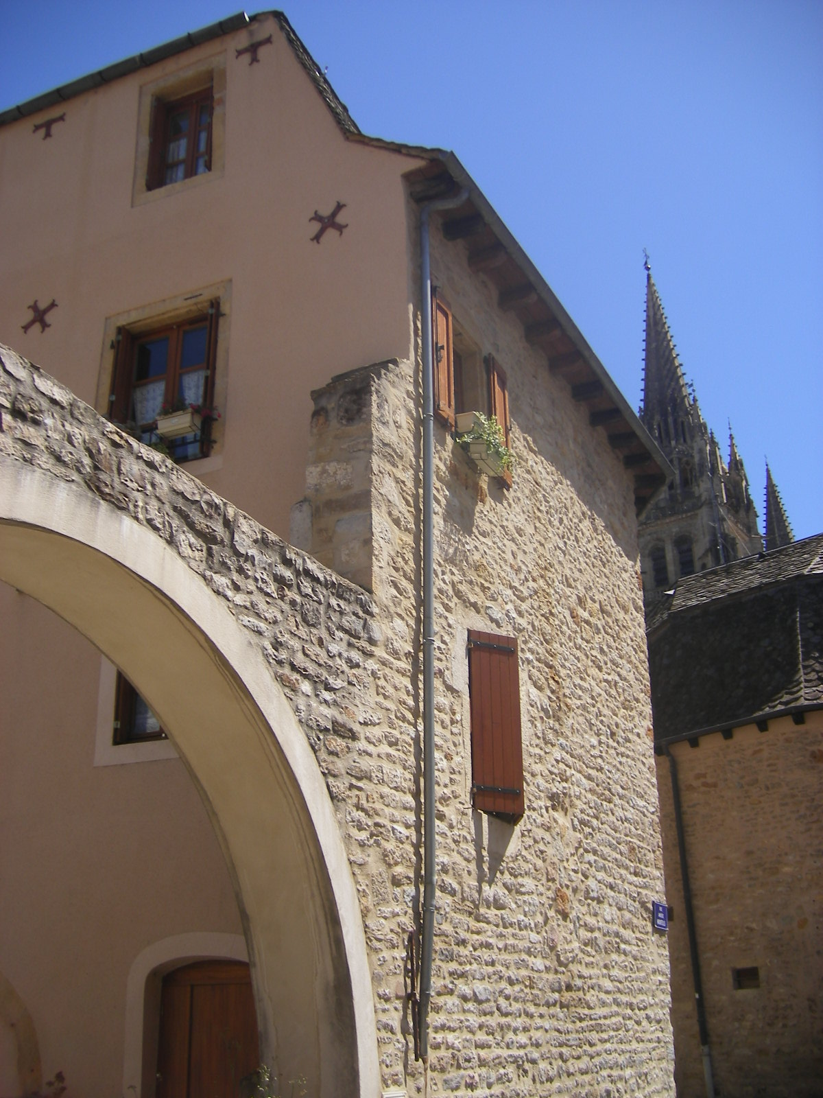 Mende, France